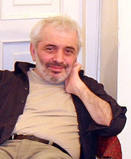 Georgian artist Levan Lagidze in Tbilisi, 23 June 2008.